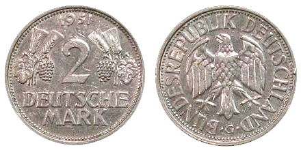 2 mark